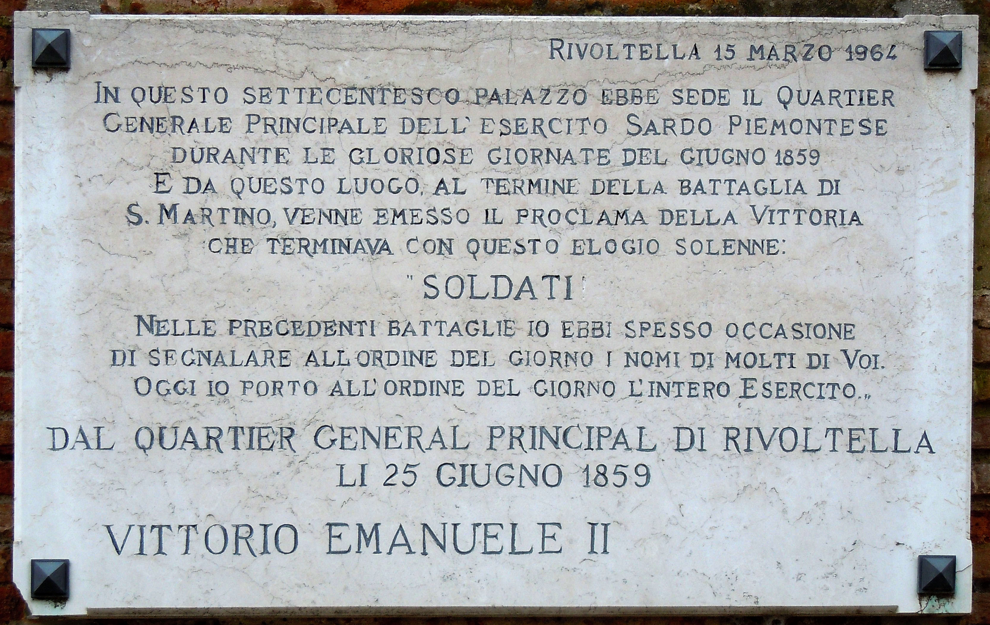 Rivoltella del Garda, lapide a Vittorio Emanuele II